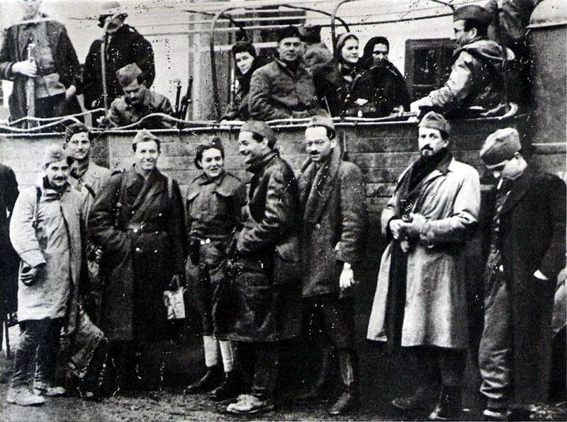 Na fotografiji je slovenska delegacija, ki je šla na zasedanje AVNOJ-a v Jajcu.